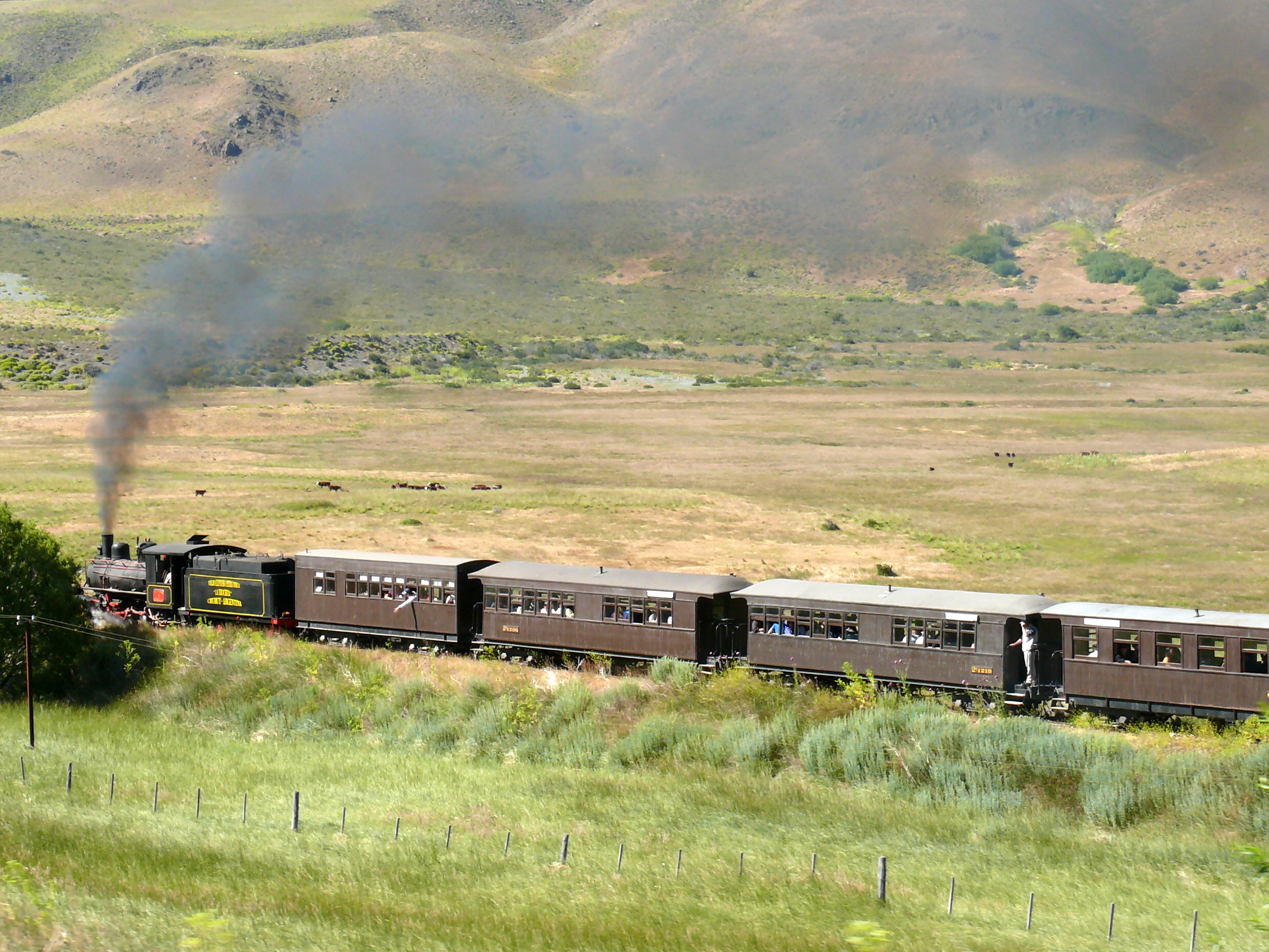 La Trochita